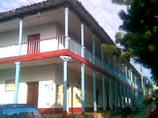 Edificio donde se encuentra la Alcaldía de Agua de Dios.